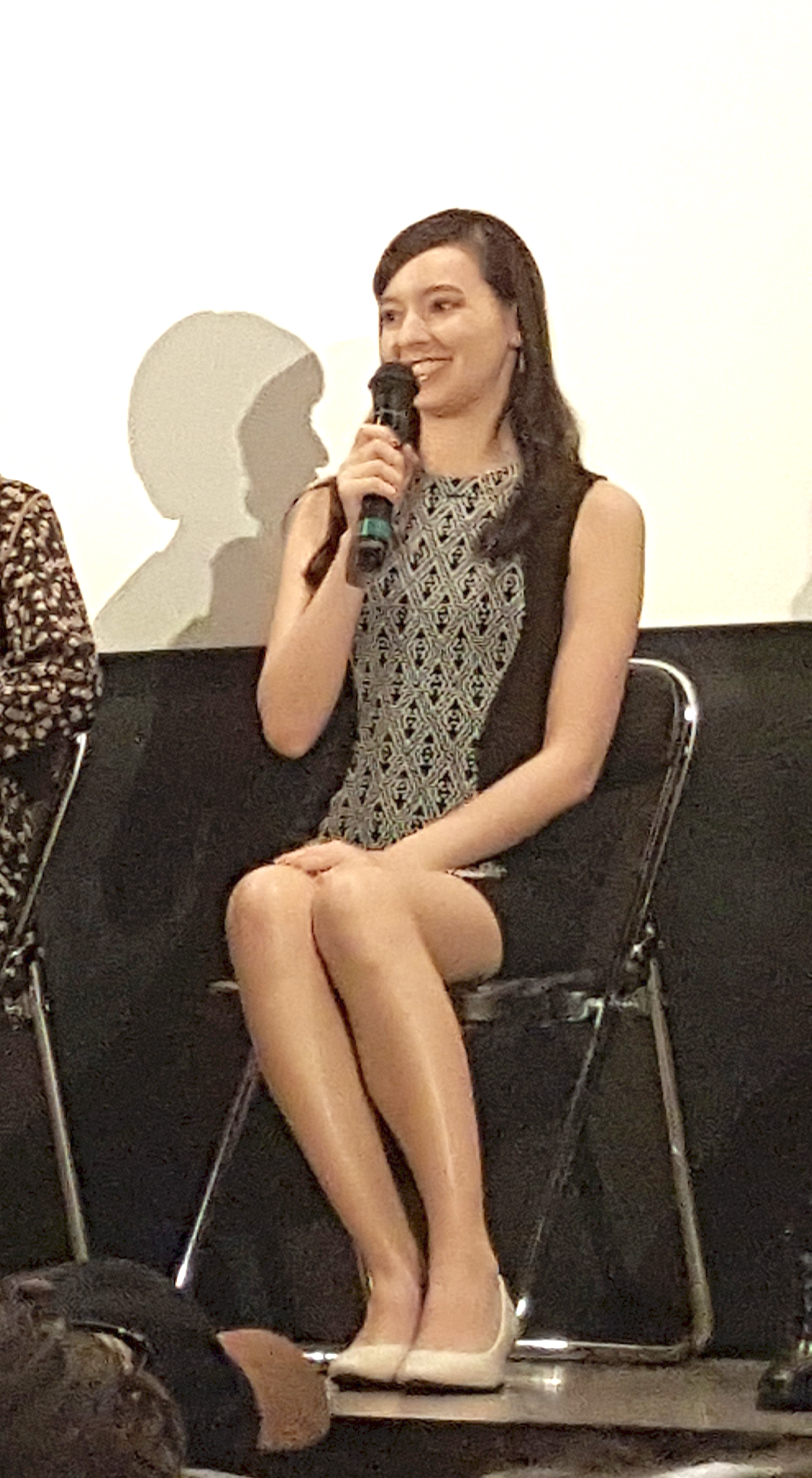 映画「バージン協奏曲 それゆけ純白パンツ!」公開舞台挨拶（2019年）